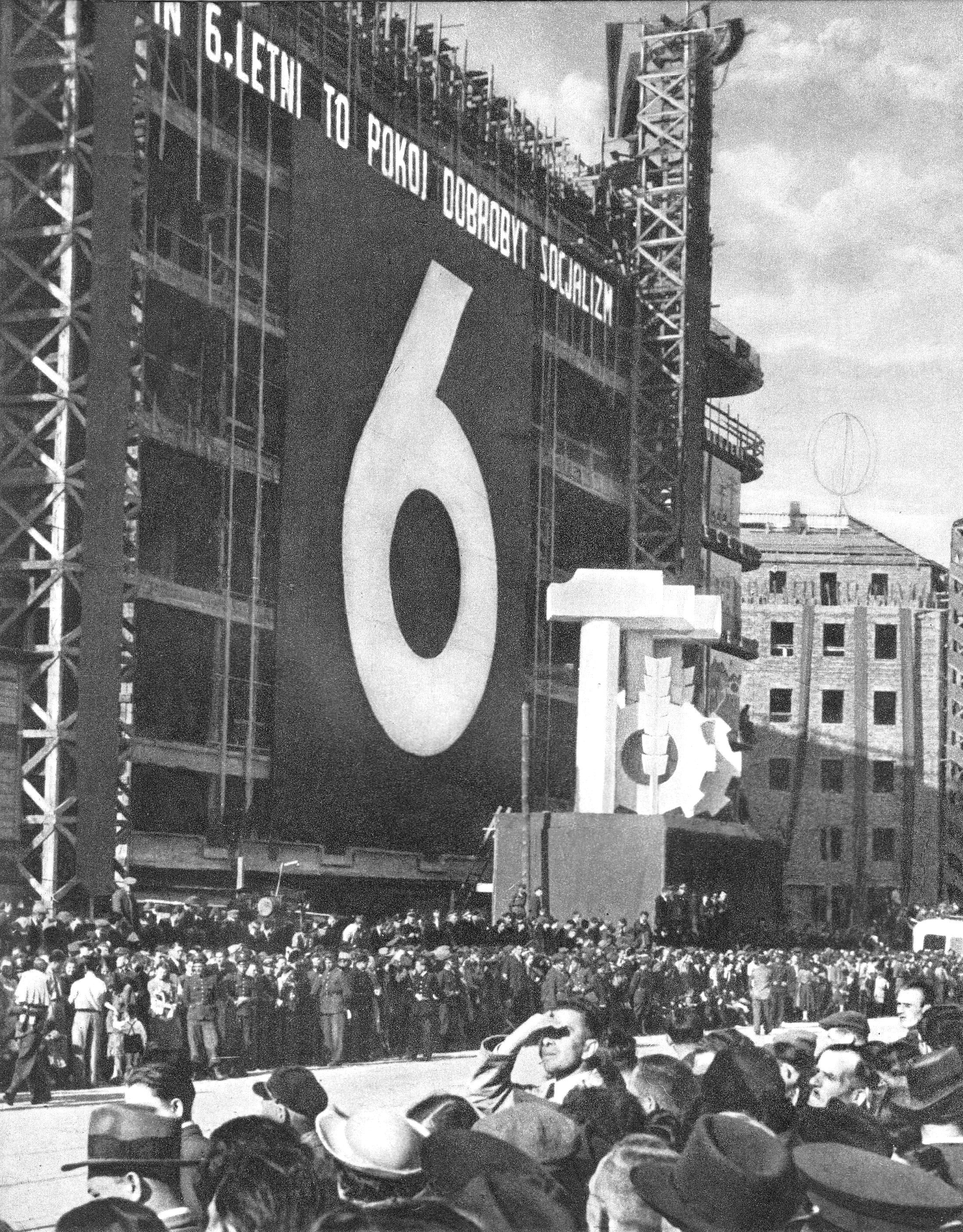 Pochód pierwszomajowy w Alejach Jerozolimskich w Warszawie. widoczny budowany Centralny Dom Towarowy